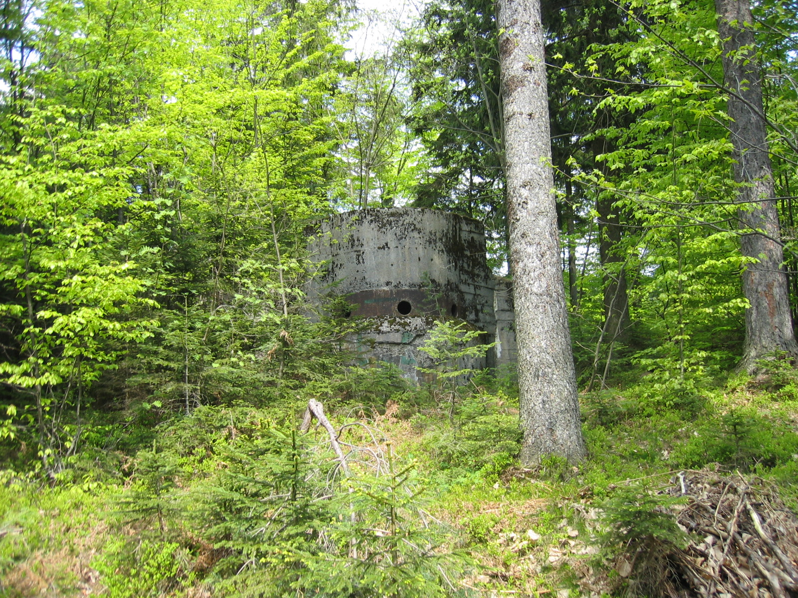 Bunker na Rupnikovi liniji.